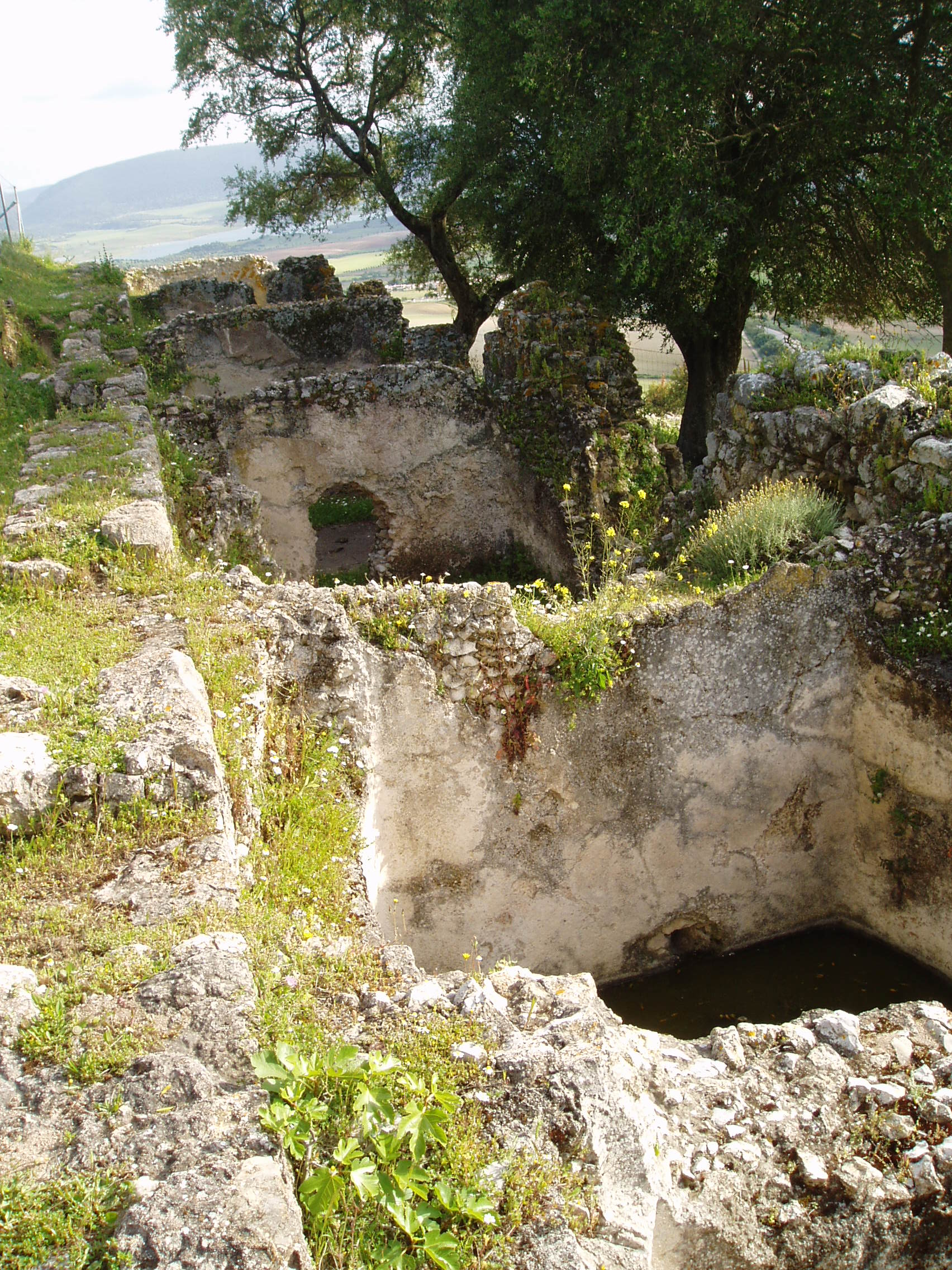 Cisternas de decantación (Piscinae Limariae) en Calduba, en la Sierra de Aznar, perteneciente al término municipal de Arcos de la Frontera (provincia de Cádiz, Andalucía-España).